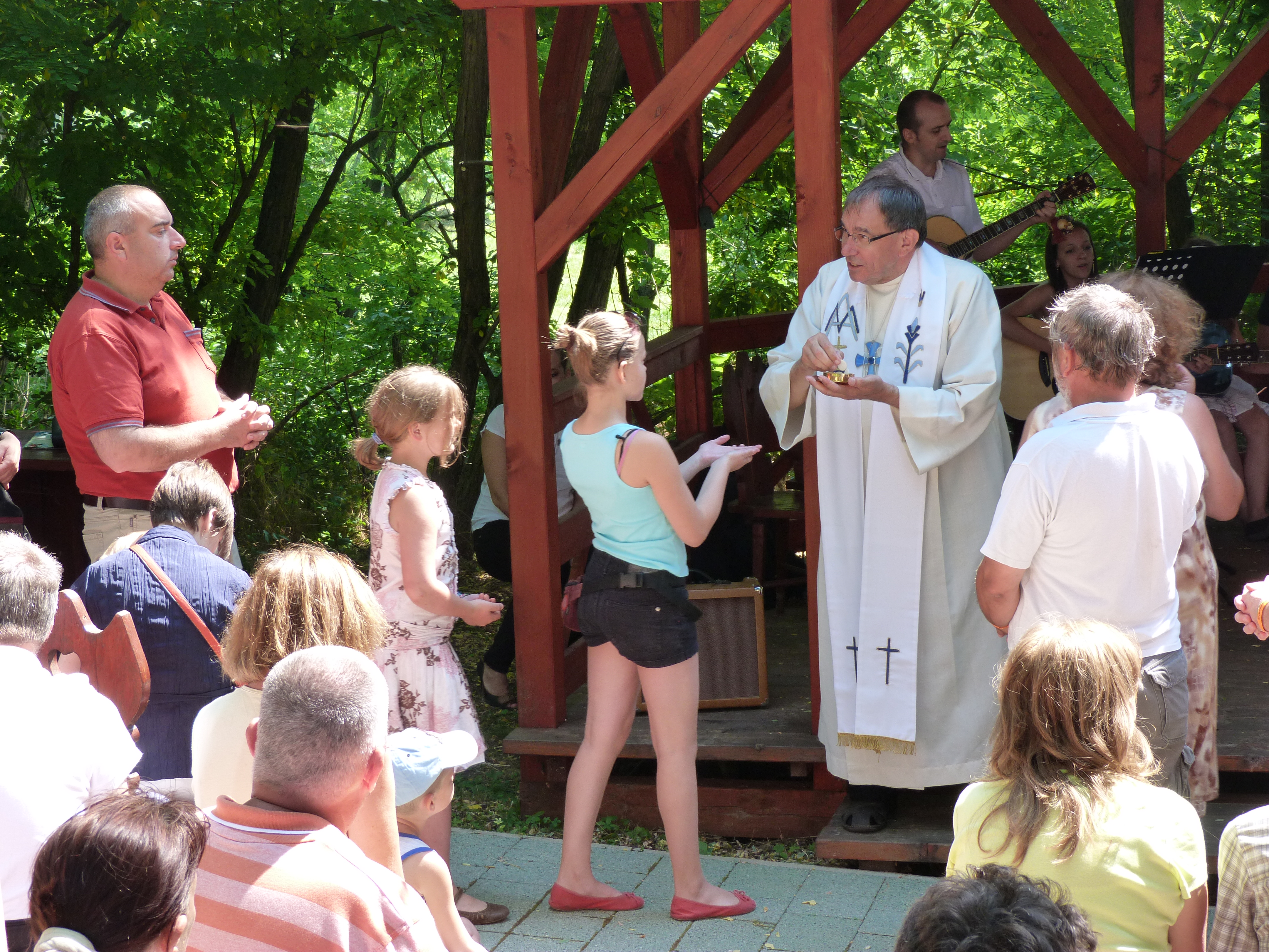 A 8. Ghymes Fesztivál harmadik napján, 2013. Július 7 –én Farkas István (Lupus) piarista igazgató tartott szentmisét Hegymagason, a Szent György Pincénél. Lupus atya szentbeszédében a gyermeki lelkület fontosságáról beszélt. (1,3). Mosonmagyaróvári piarista diákok – vezényelt Varga Virgilné (2). Szarka Gyula fesztiválzáró beszéde (4). ©© Derzsi Elekes Andor, Budapest, 2013, You are authorised to use these photos and vids under Creative Commons – even for commercial, for profit purposes. Photos must be attributed to Derzsi Elekes Andor. All of the photos and vids in the Metapolisz DVD line are under Creative Commons and can be used even for commercial – for profit – purposes. Recommended Citation Derzsi Elekes Andor: Metapolisz DVD line